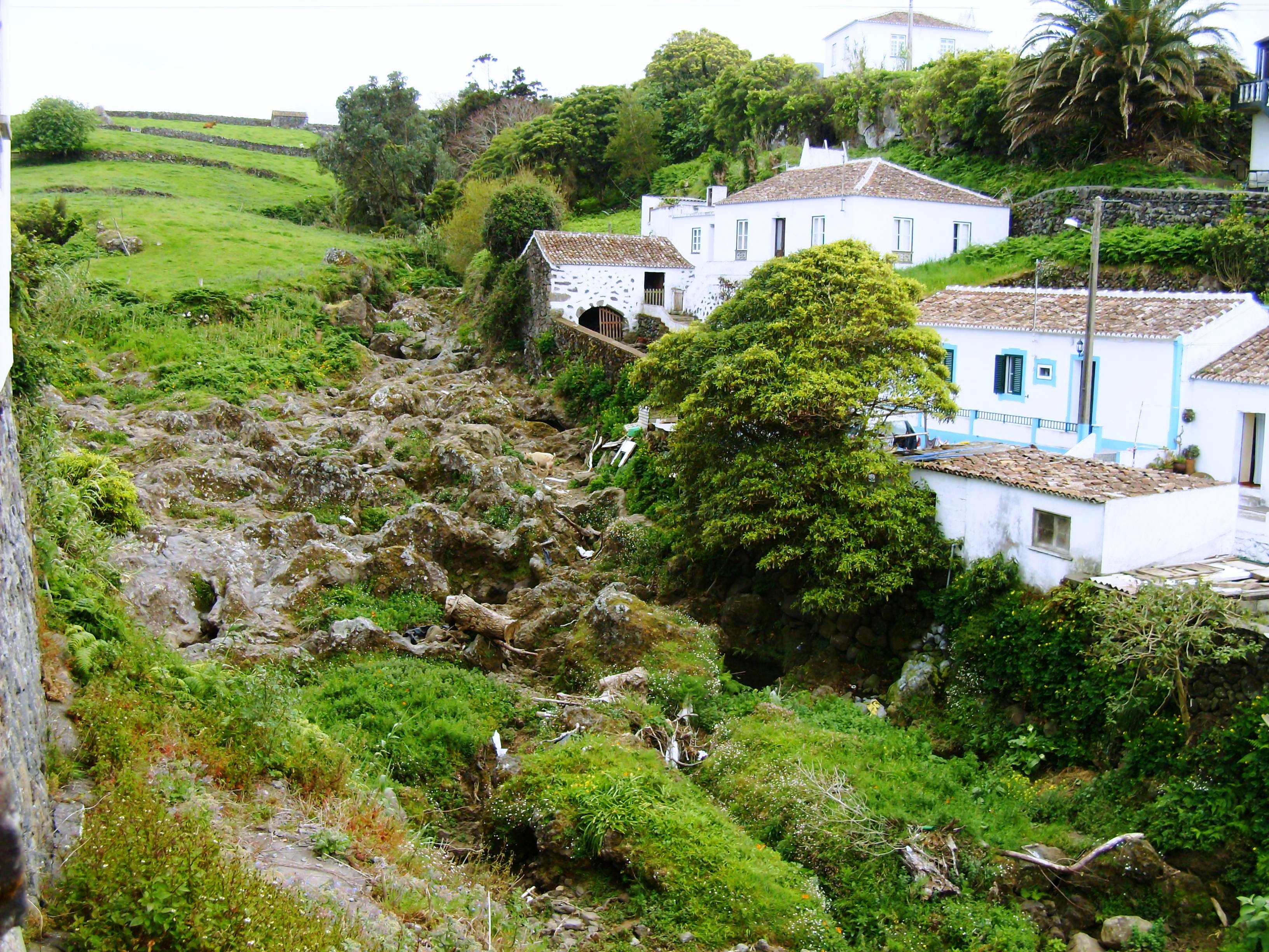 Ribeira de São Roque, Altares, Angra do Heroísmo, Ilha Terceira, Açores.